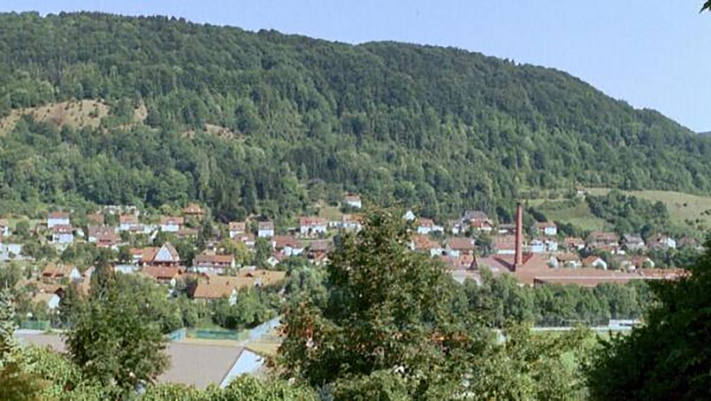 Gosbach, Bad Ditzenbach, Deutschland.